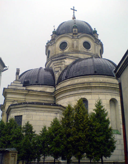 Монастир Василіян: м. Жовква